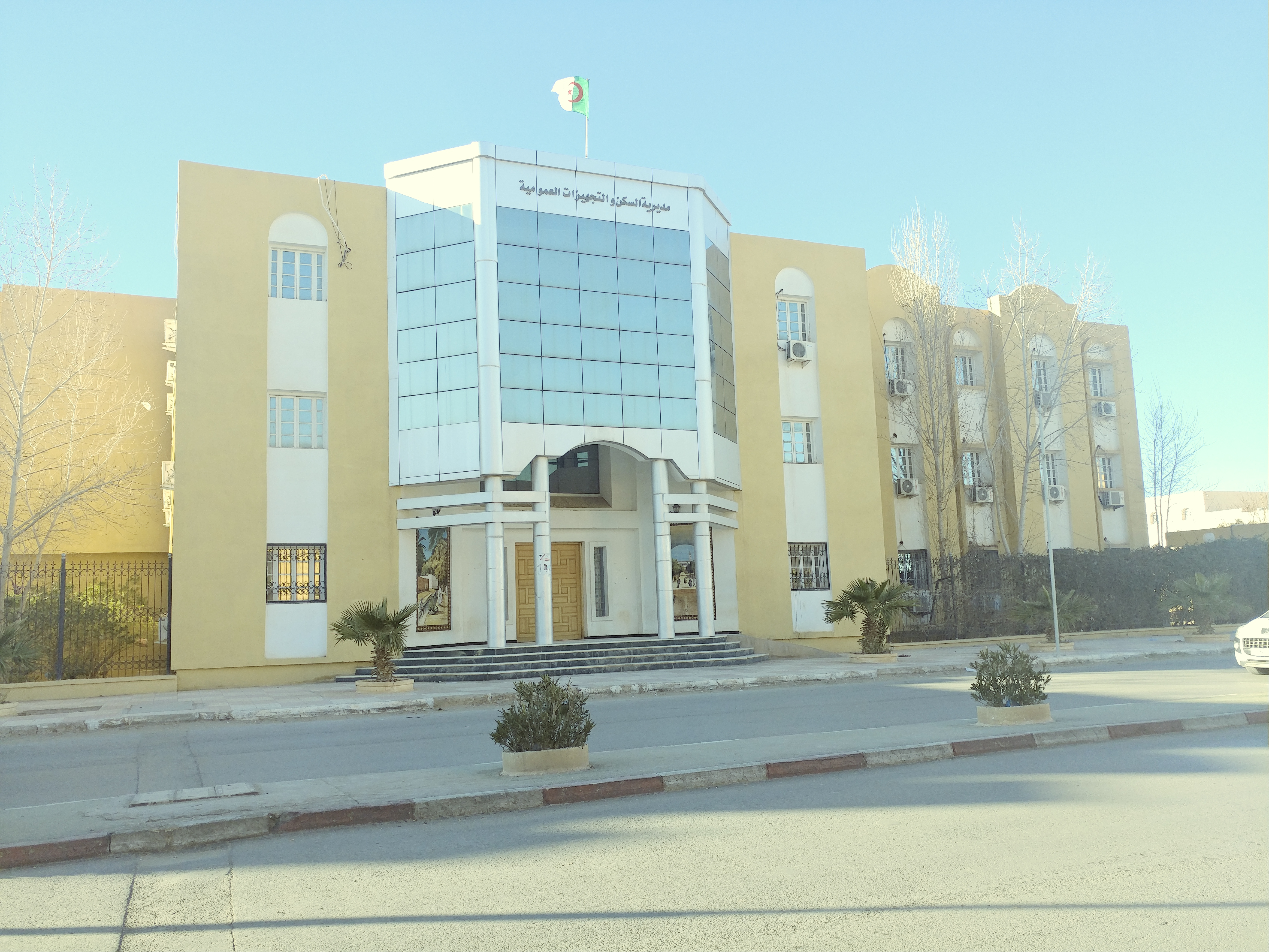 مقر مديرية السكن و التجهيزات العمومية بحي 500 سكن بالأغواط